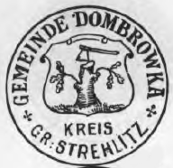 Altes Siegel des Ortes Dombrowka im Kreis Oppeln, Schlesien.